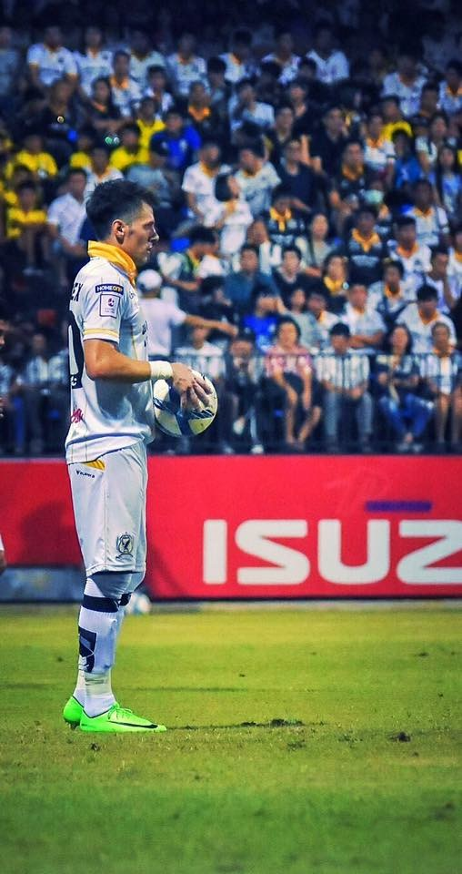 Foto 01